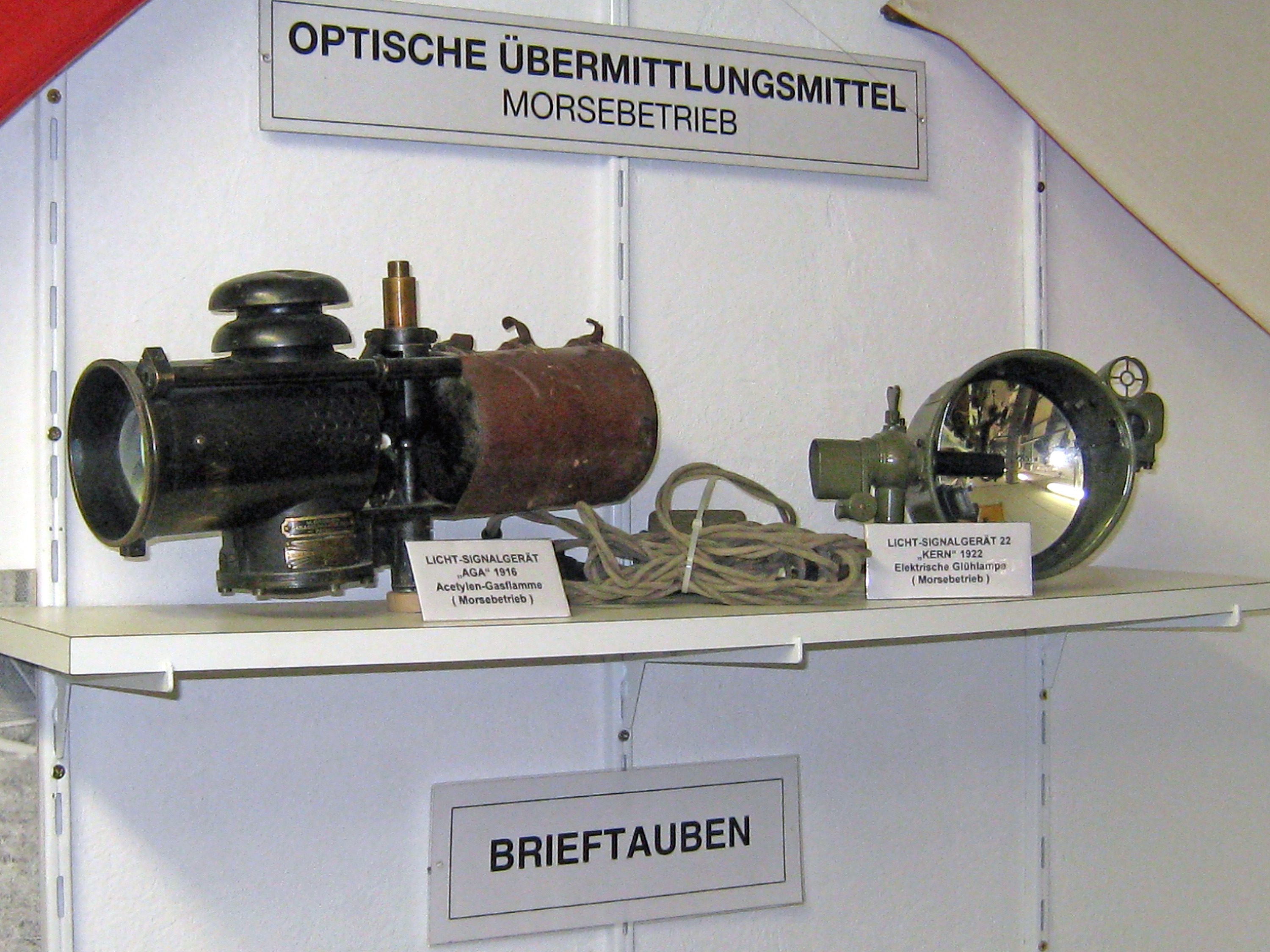 Licht-Signalgeräte, fotografiert in der Festung Heldsberg, St. Margrethen, Kanton St. Gallen